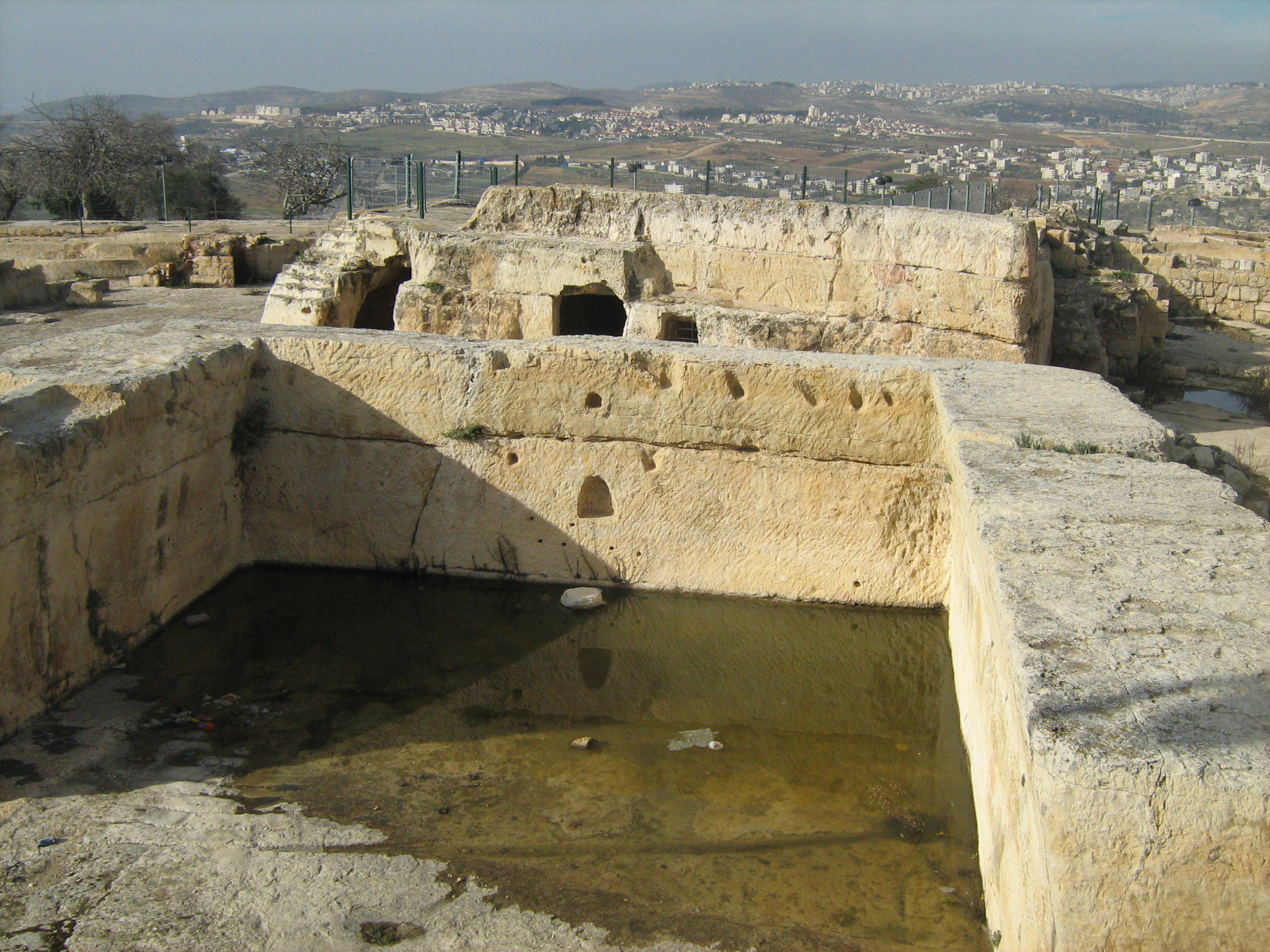 נבי סמואל